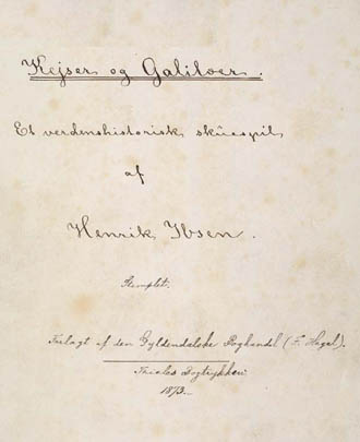 Авторская рукопись пьесы "Кесарь и Галилеянин"